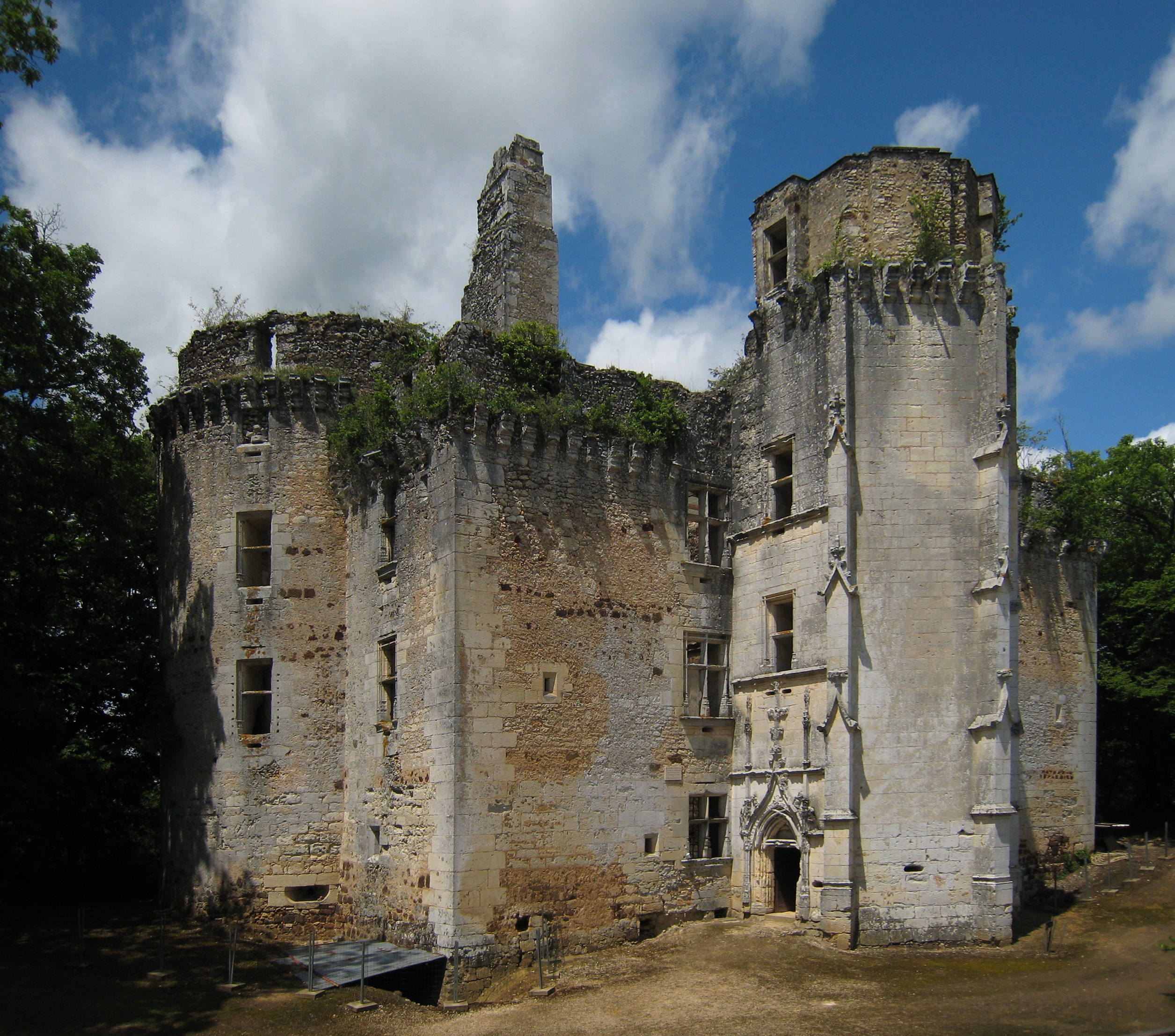 Château de l'Herm in the village of Rouffignac-Saint-Cernin-de-Reilhac, Département Dordogne/France. Object location45° 04′ 40.9″ N, 0° 57′ 34.7″ E